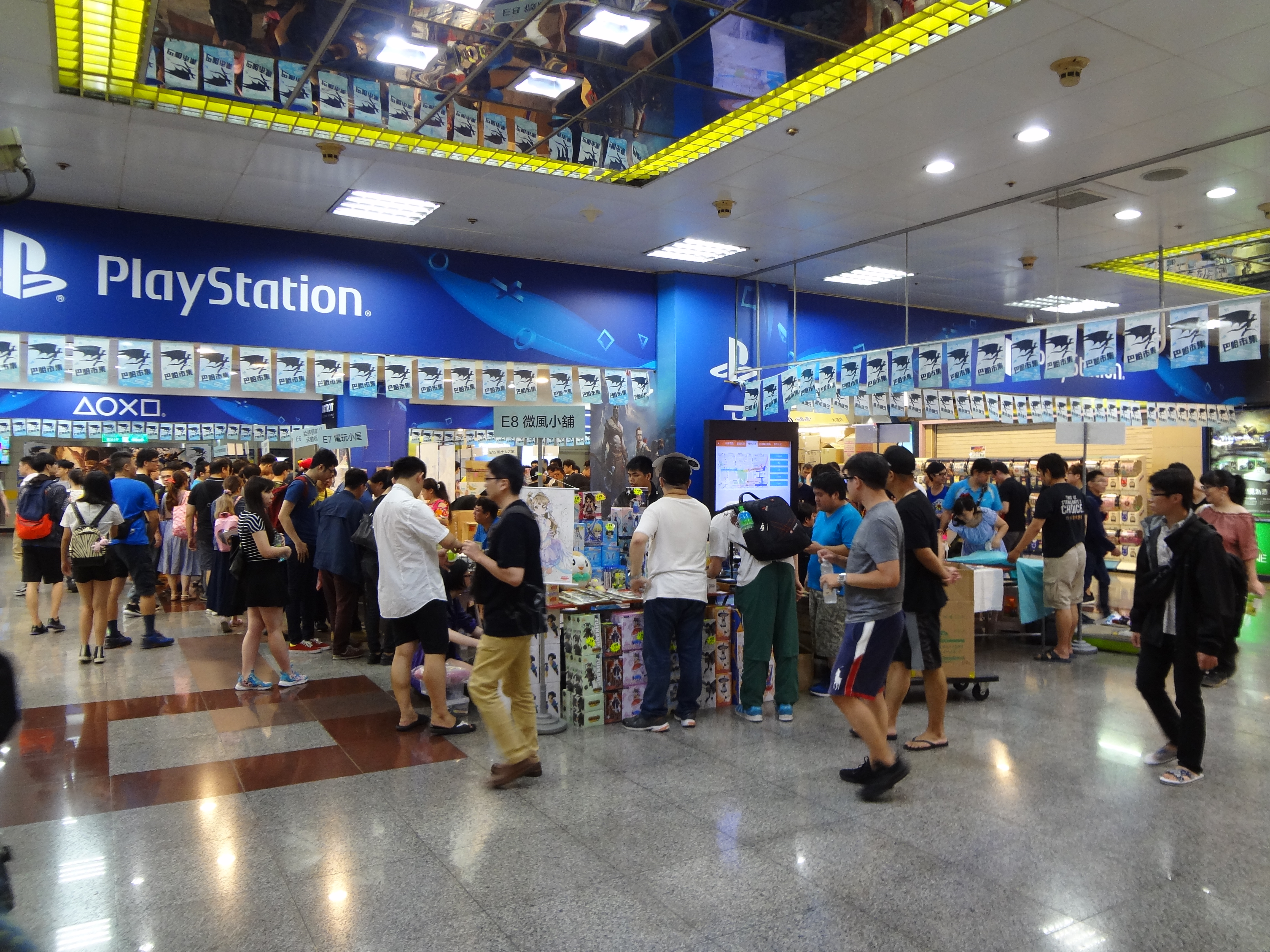 中文（台灣）: 2018巴哈市集E區。